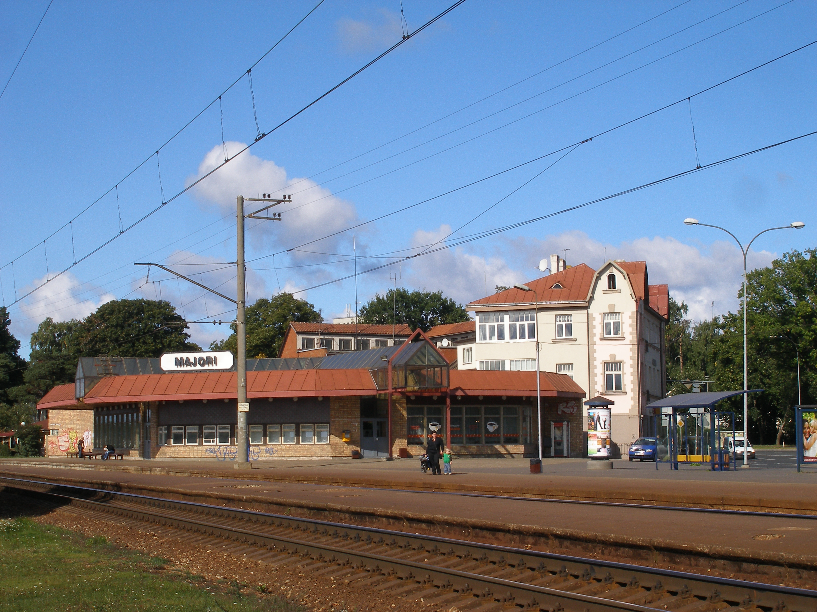 Majoru stacijas ēka.